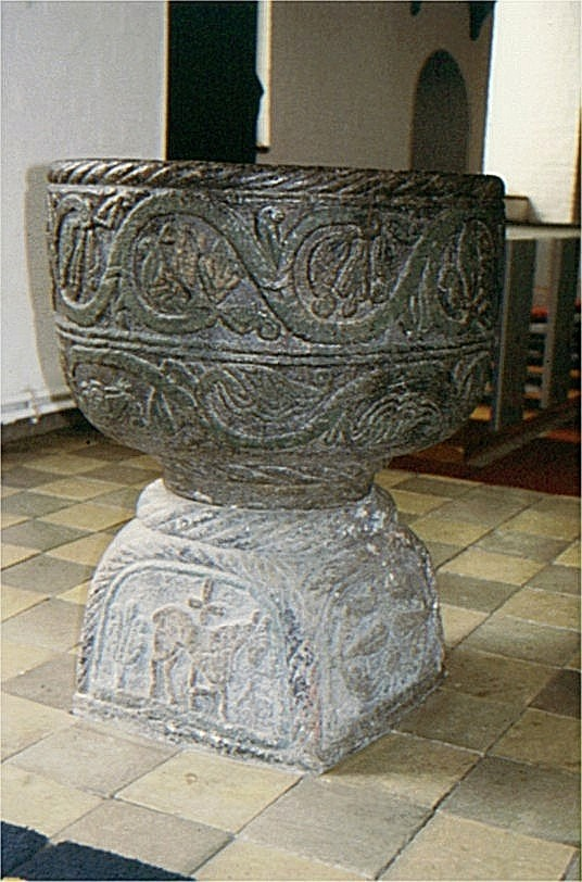 Hürup Kirke i Sydslesvig. Hürup kirke, døbefont